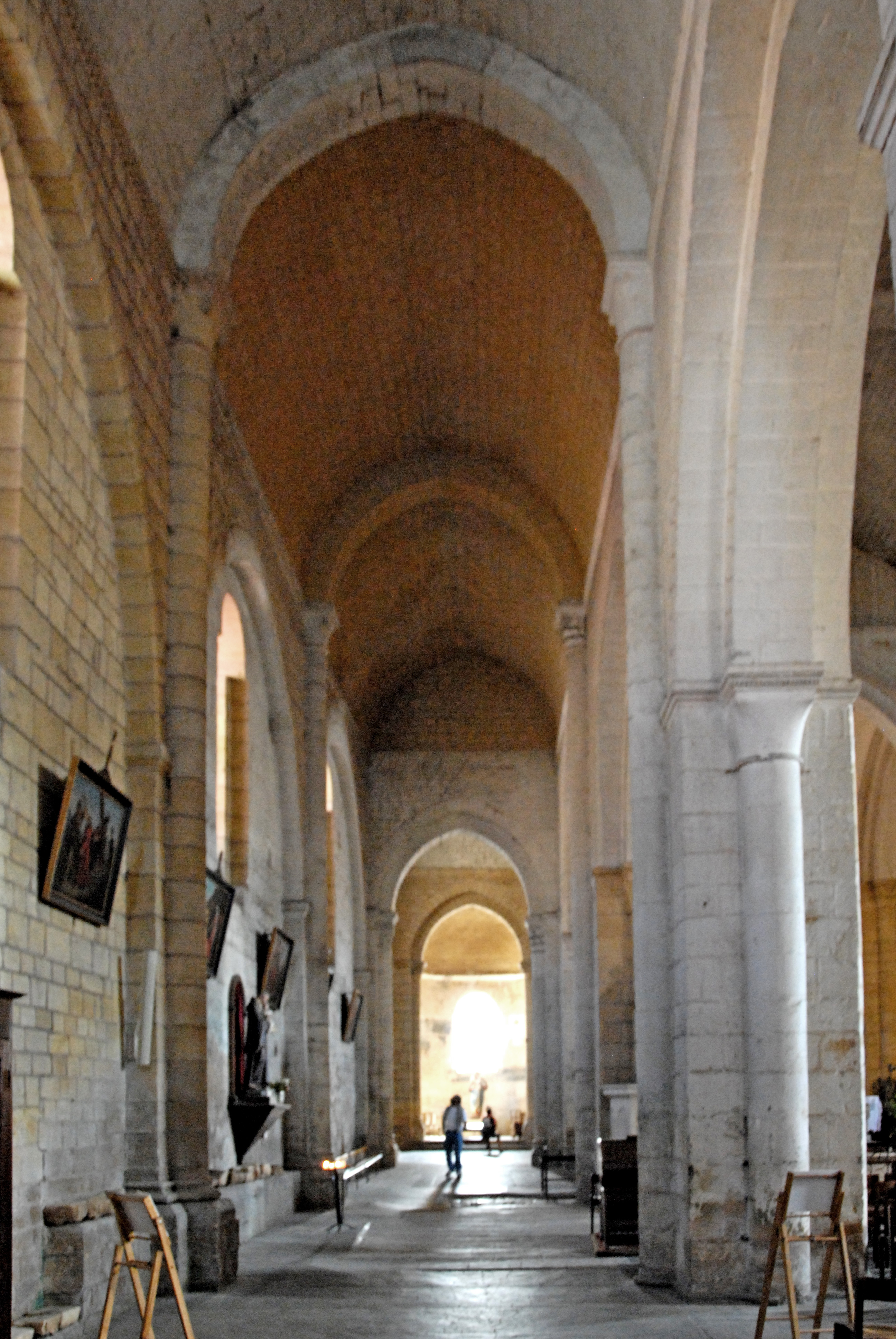 Cadouin, nördl. Seitenschiff